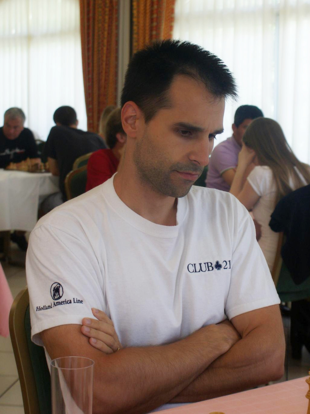 GM Julen Luis Arizmendi Martinez, 30 Open Internacional d'Andorra, Hotel Sant Gothard, Ronda 6 - 26/07/2012